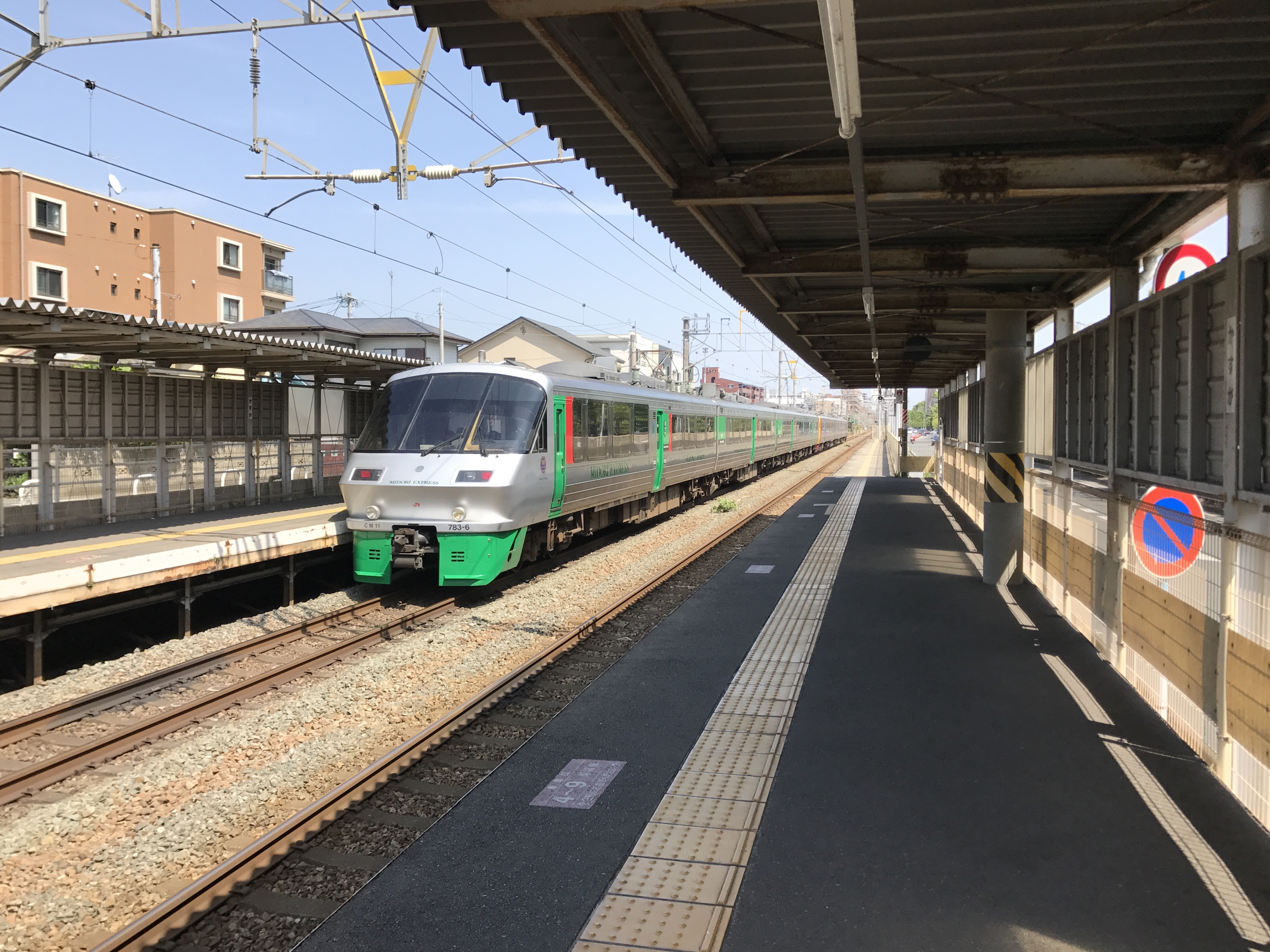 春日駅を通過する佐世保行き特急「みどり」